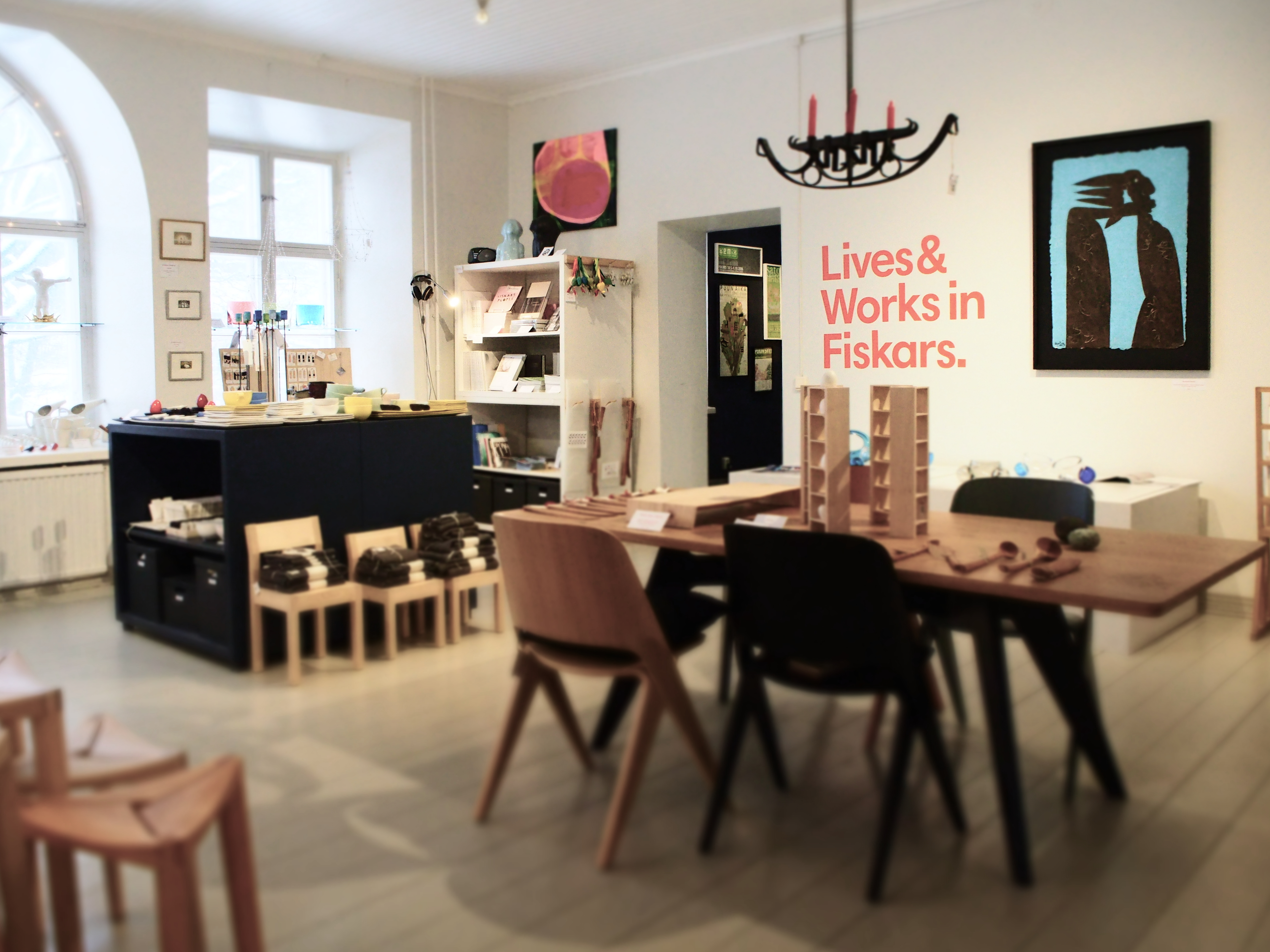 Onoma Shop Tornikellorakennuksessa Fiskarsissa.